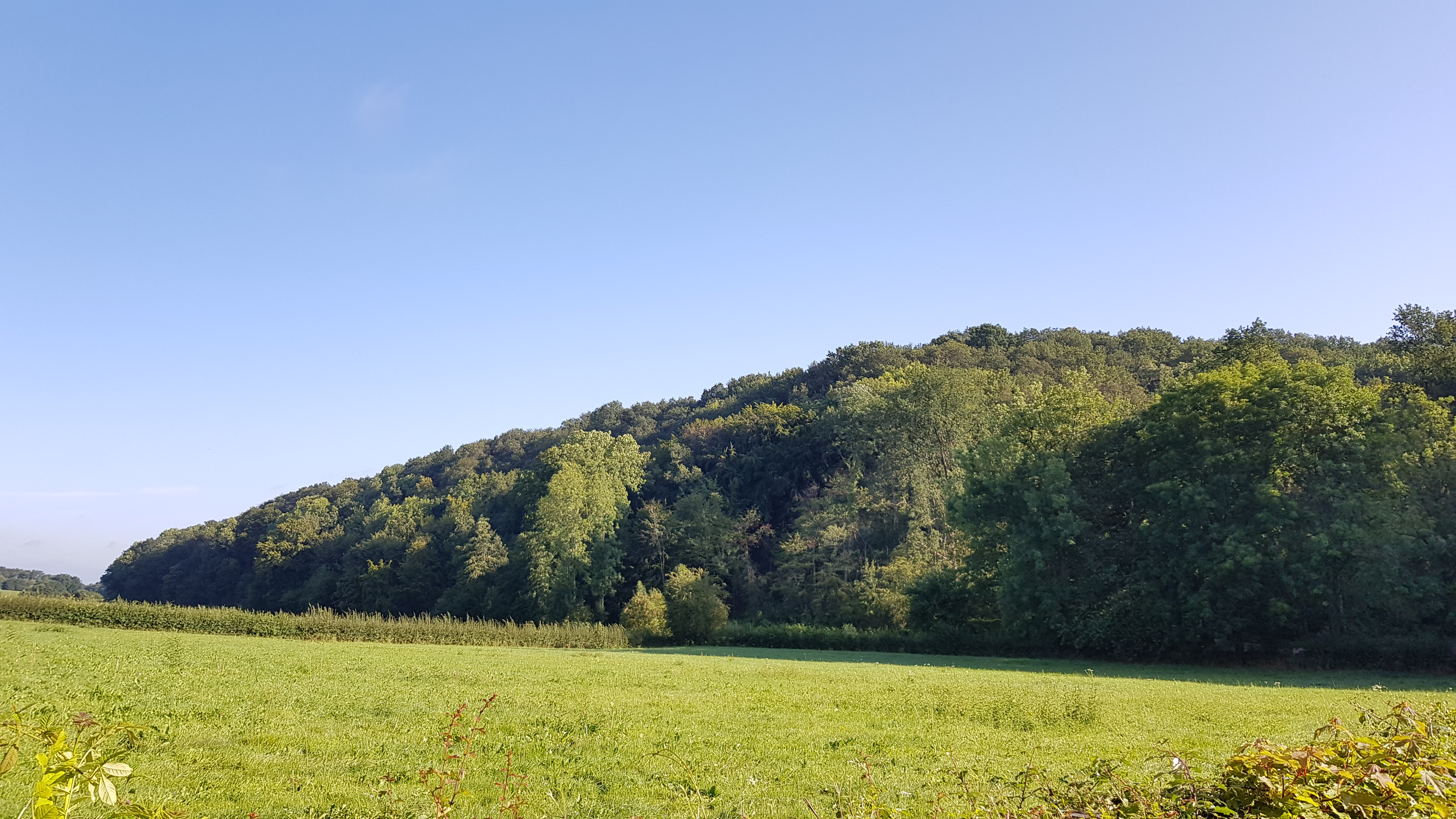 Bundersberg gezien vanaf Keunestraat, Cadier en Keer, Nederland